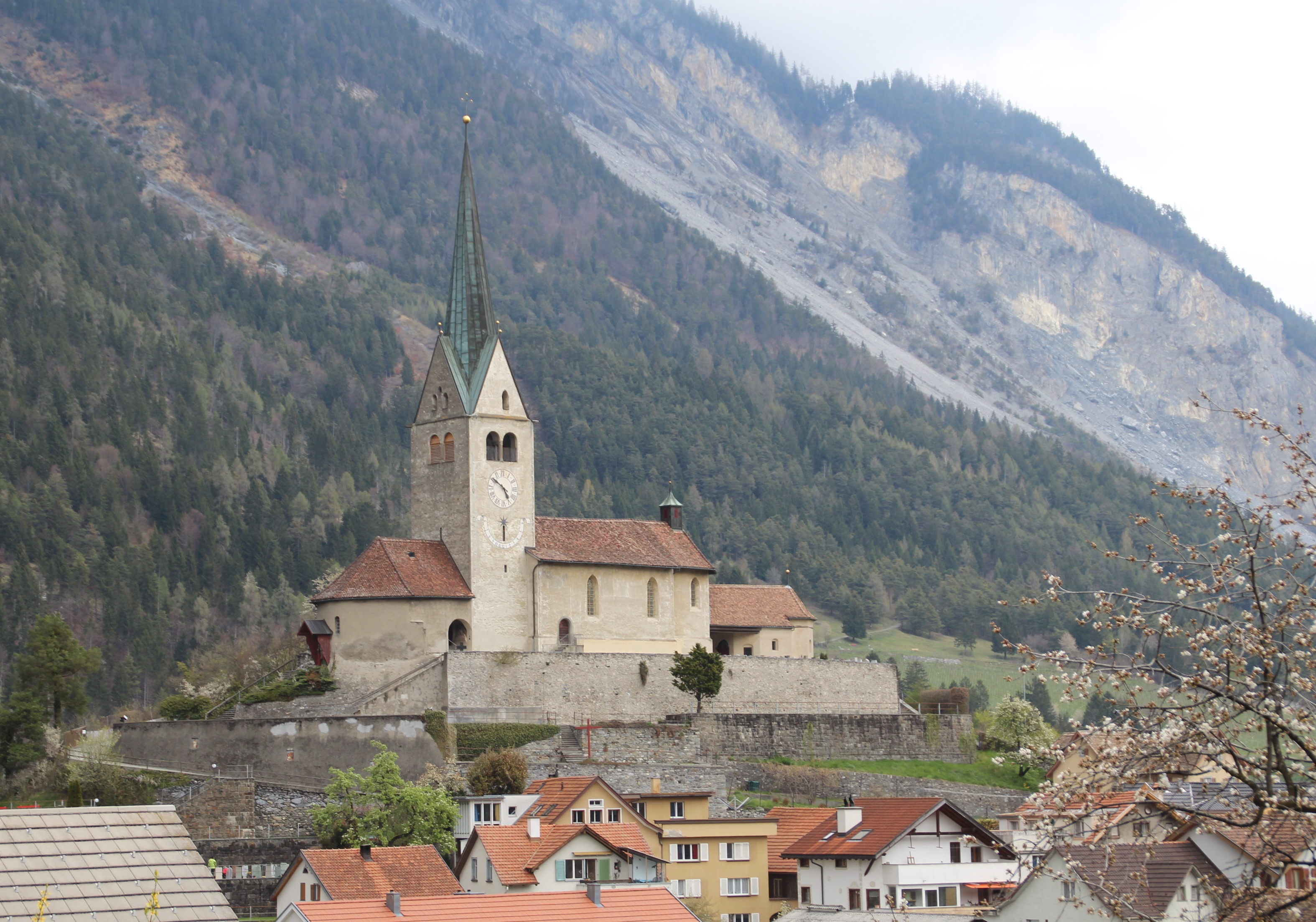 Ems)